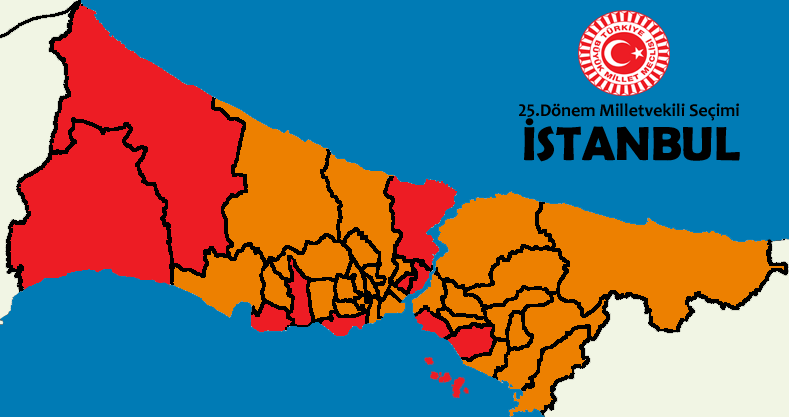 2015 genel seçim sonuçları